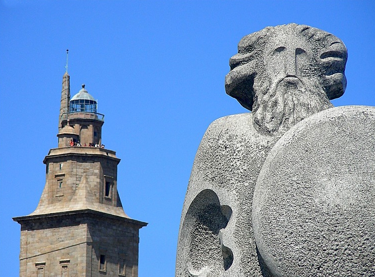 Escultura de Breogán vixiante á entrada do camiño que leva á Torre de Hércules.